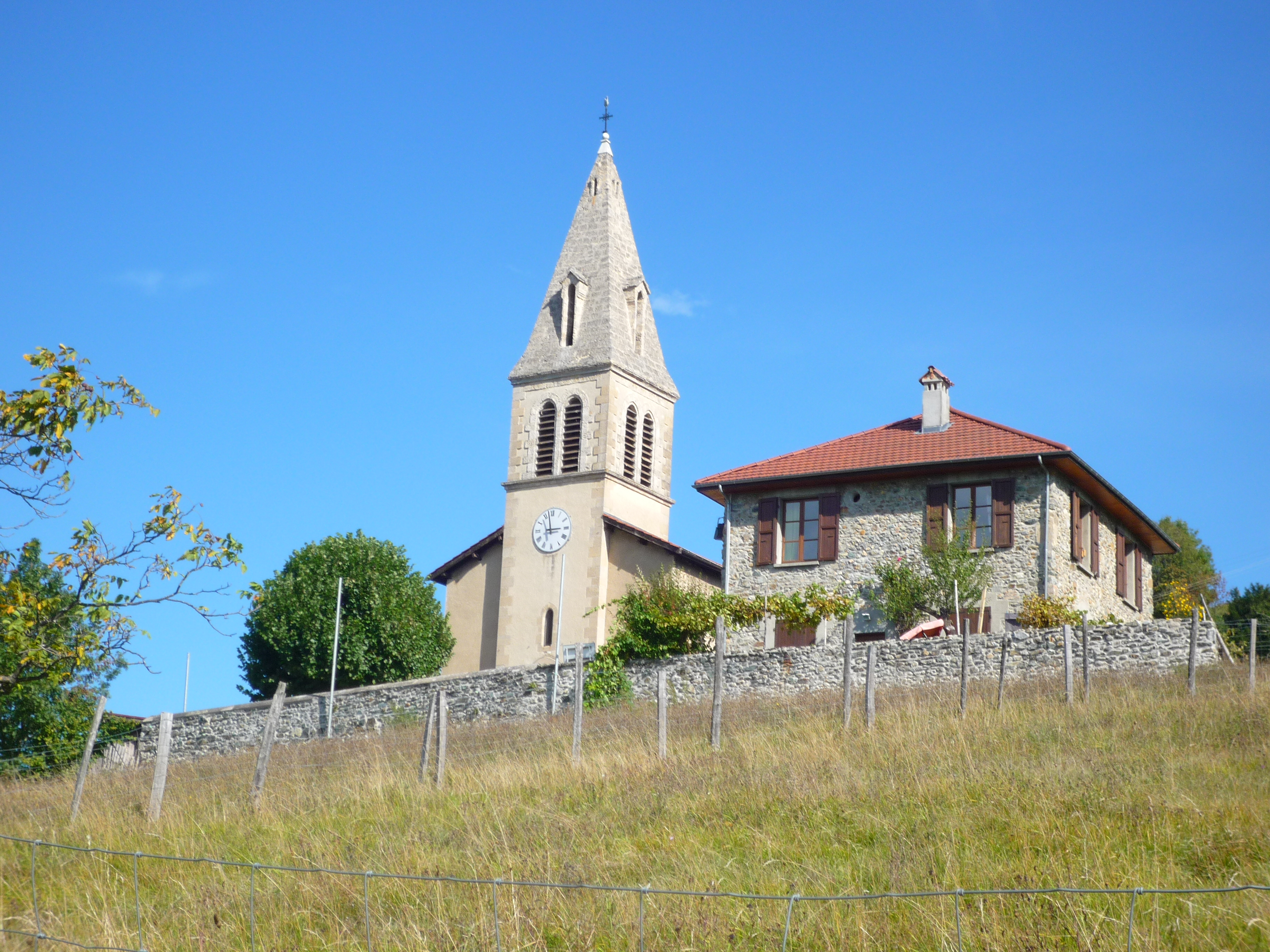 L'église du village de Venon surplombant la ville de Grenoble.